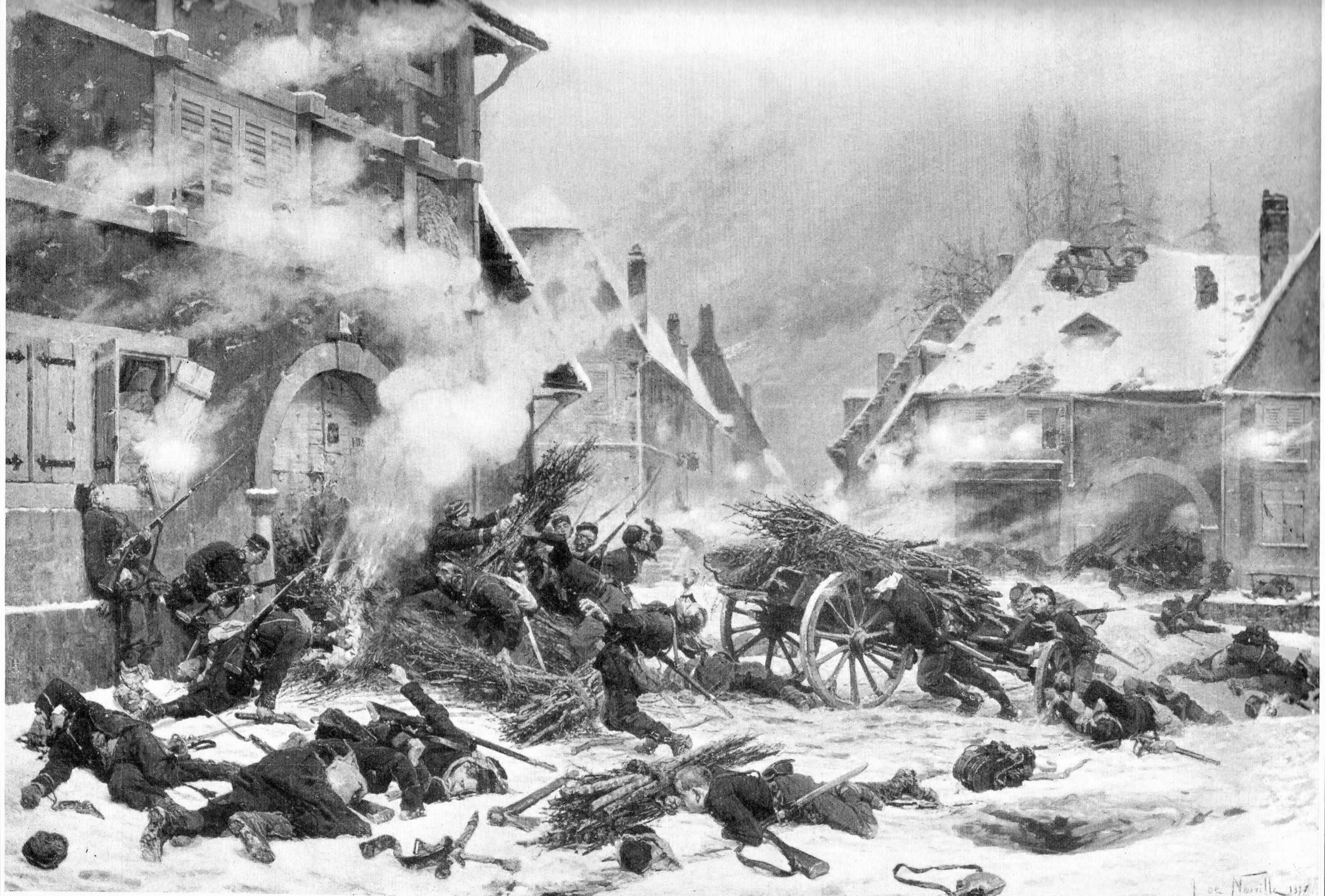 Bataille de Villersexel, 1871. Tableau d'Alphonse de Neuville